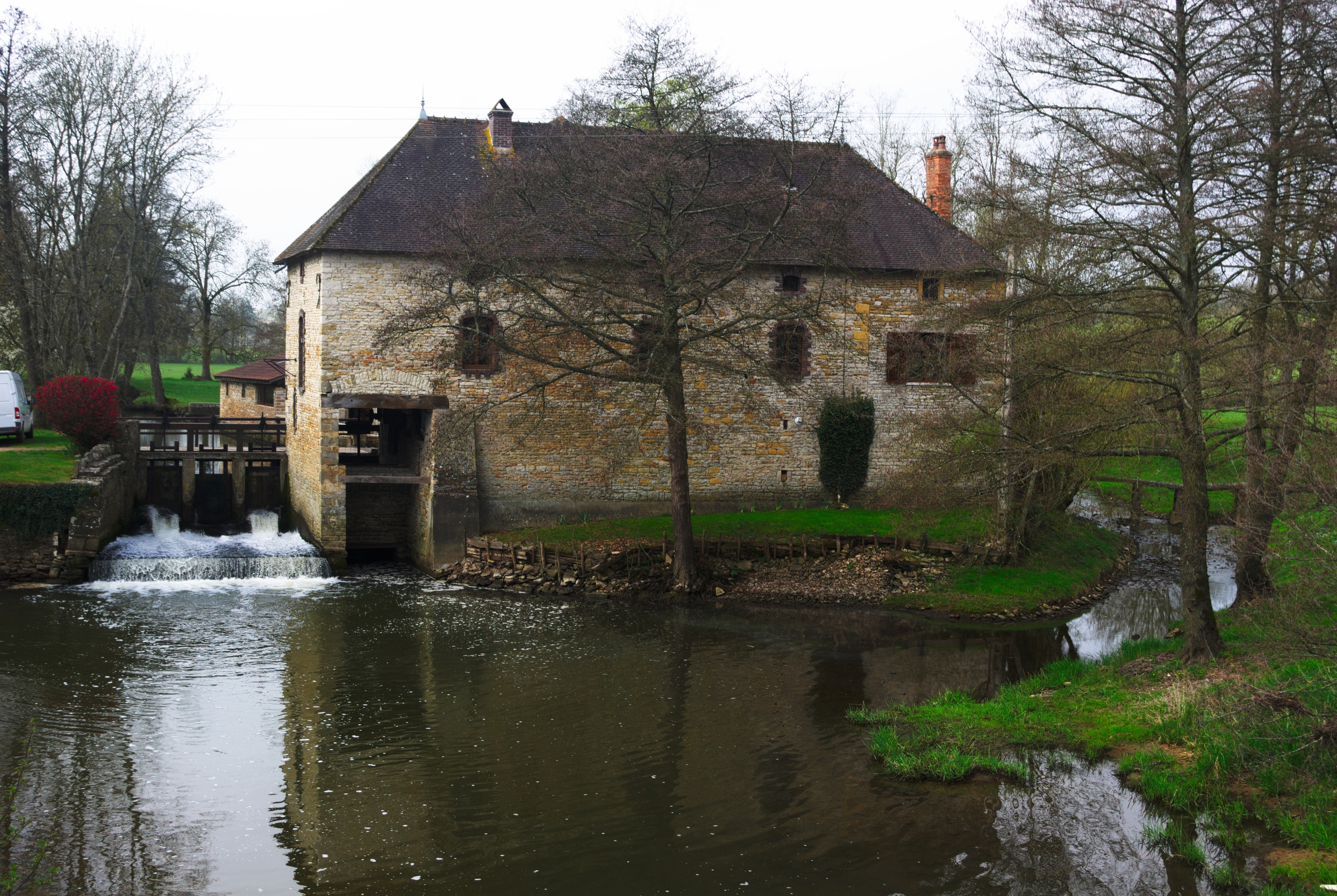 Moulin d'Angoin